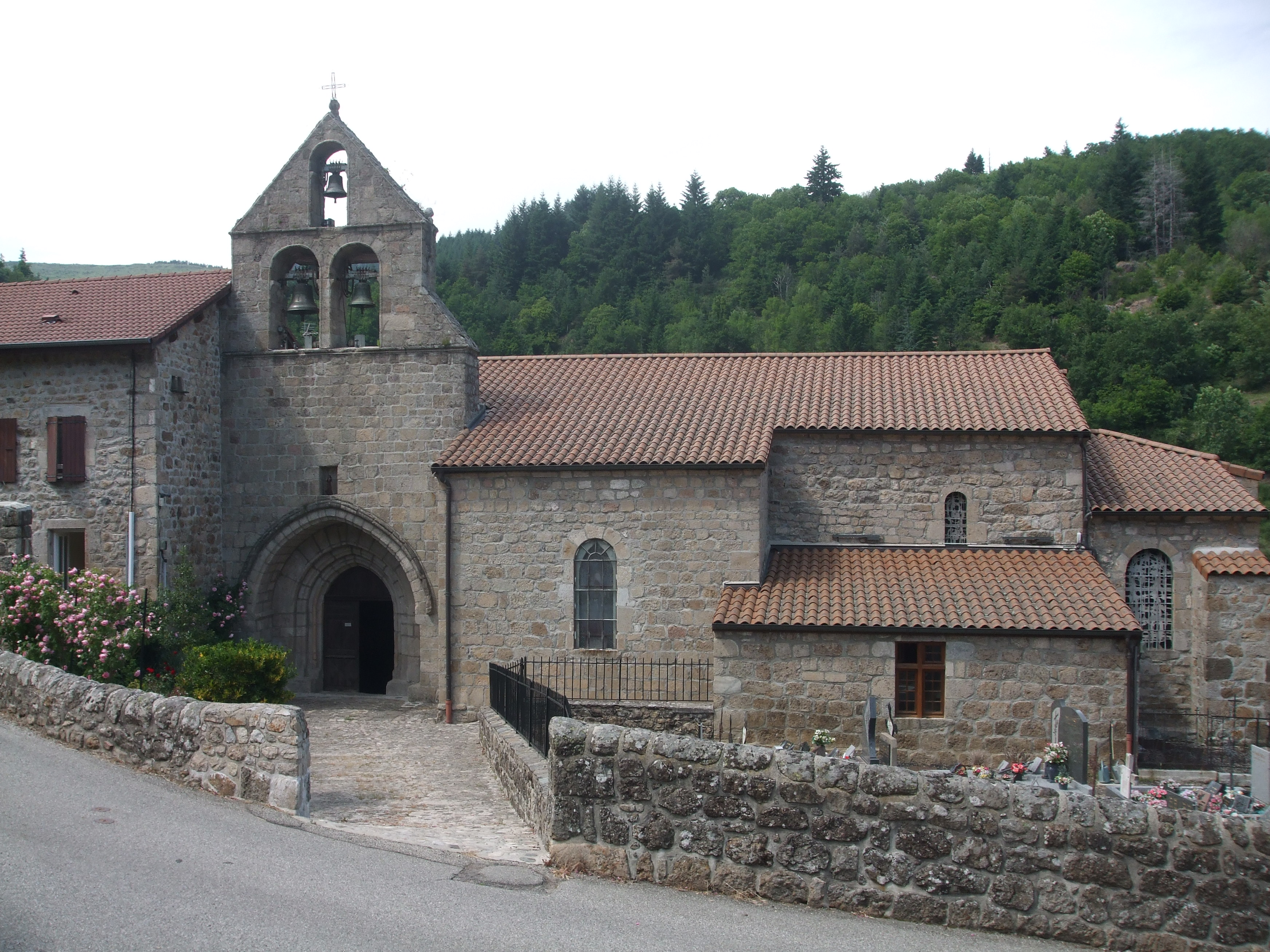 église Saint Etienne